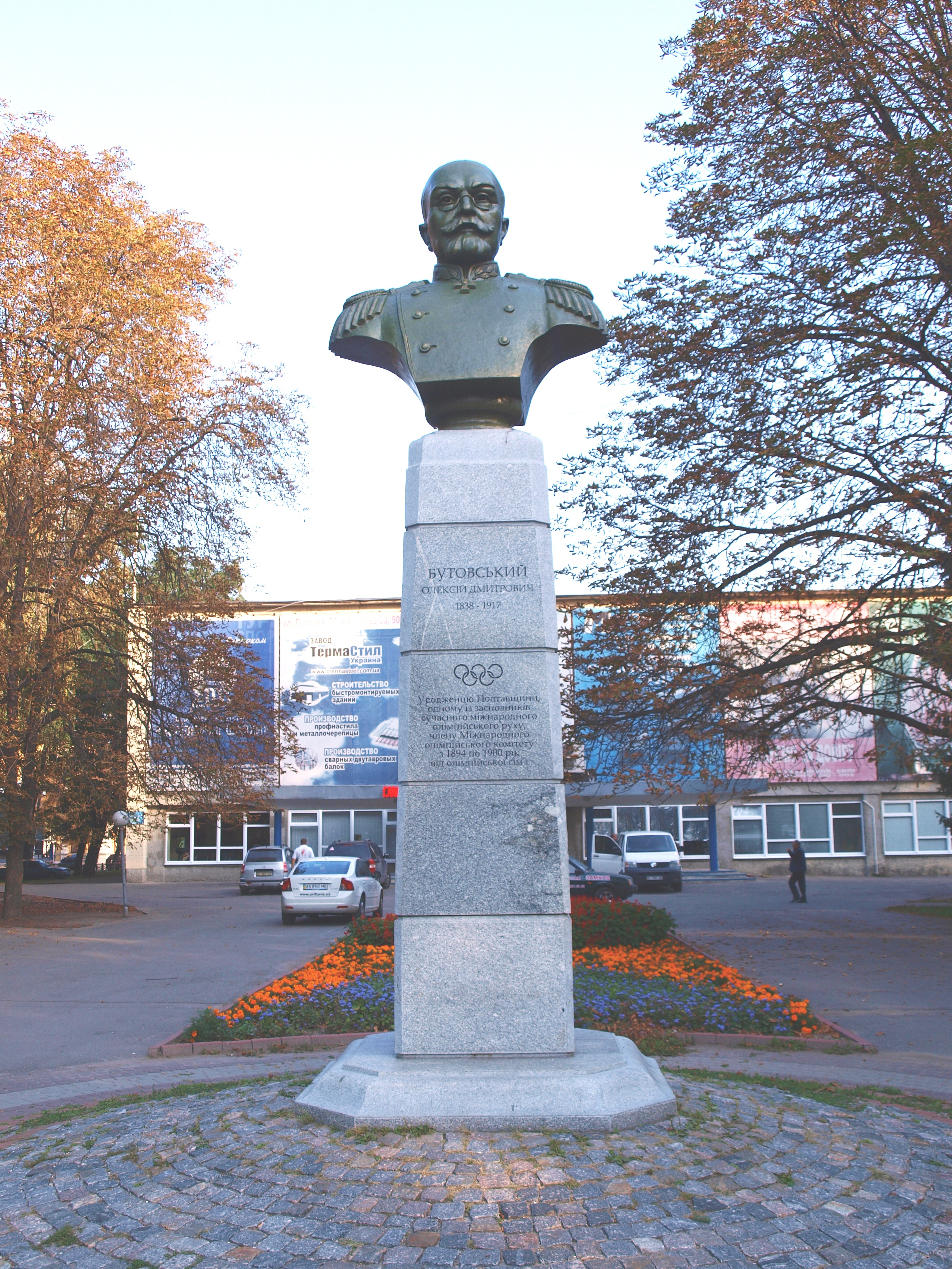 Пам'ятник погруддя основоположнику Олімпійского руху на Полтавщині О.Д. Бутовському